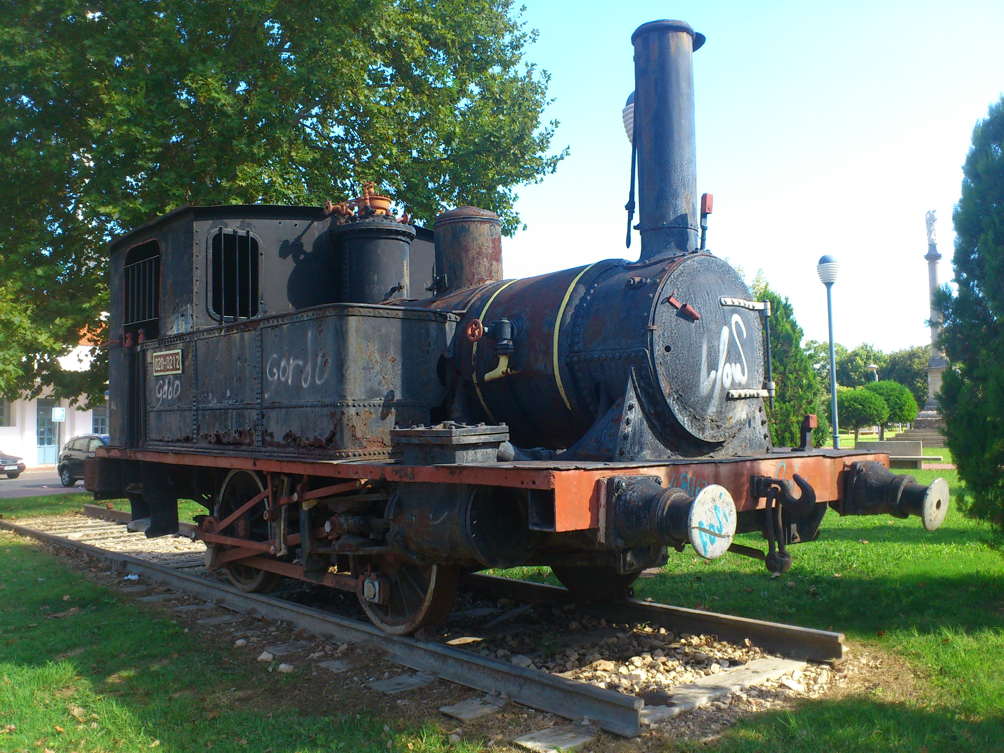 Locomotora del constructor Anjubault, situada en la Avenida de la Libertad de Córdoba (España)